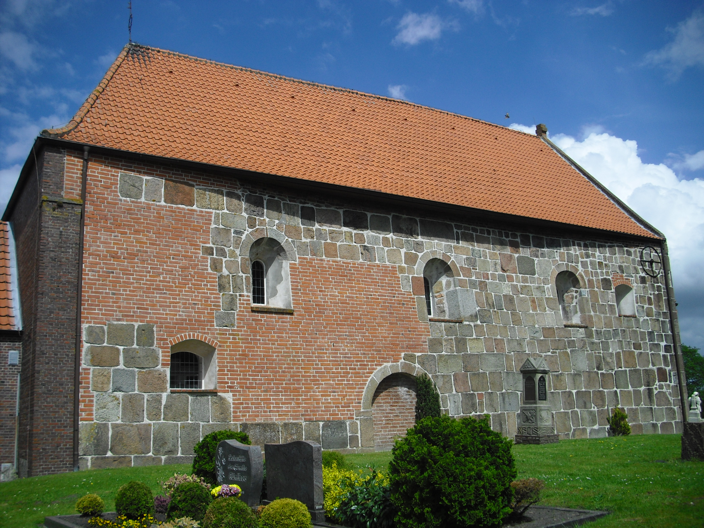 Evangelisch-lutherische Kirche in Middels (Stadtteil von Aurich, Landkreis Aurich, Niedersachsen, Deutschland): Kirchenansicht von Süden